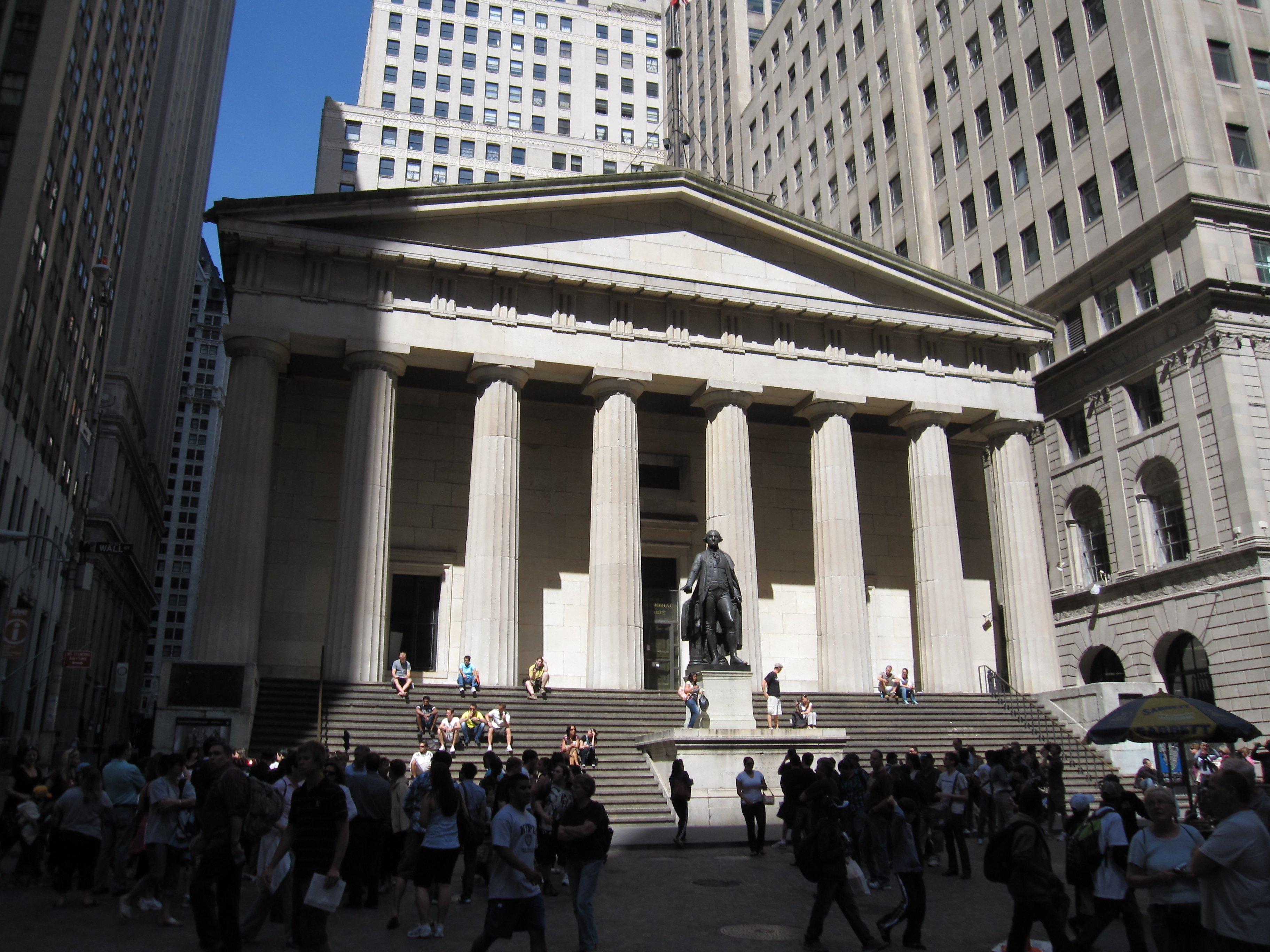 Federal Hall